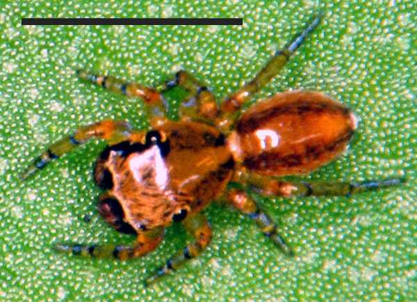 Male Neonella vinnula jumping spider from Gainesville, Alachua County, Florida, USA